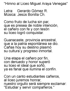 Autor: Gerardo Gómez Ramírez